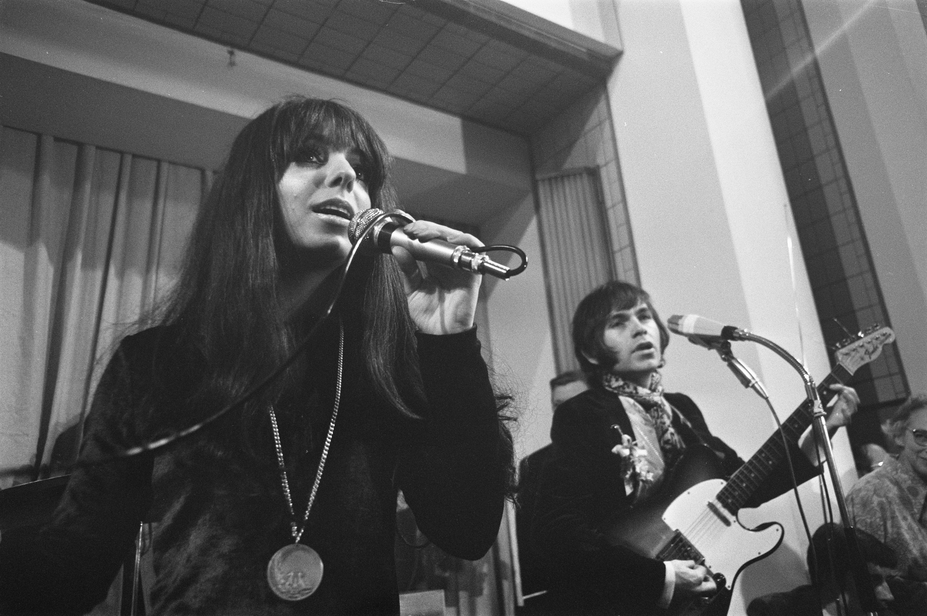 Shocking Blue treedt op in Den Haag ter gelegenheid van de ontvangst van de zilveren penning van verdiensten.